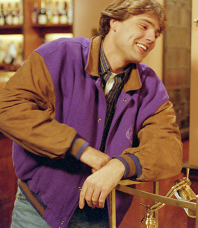 Reinout Oerlemans